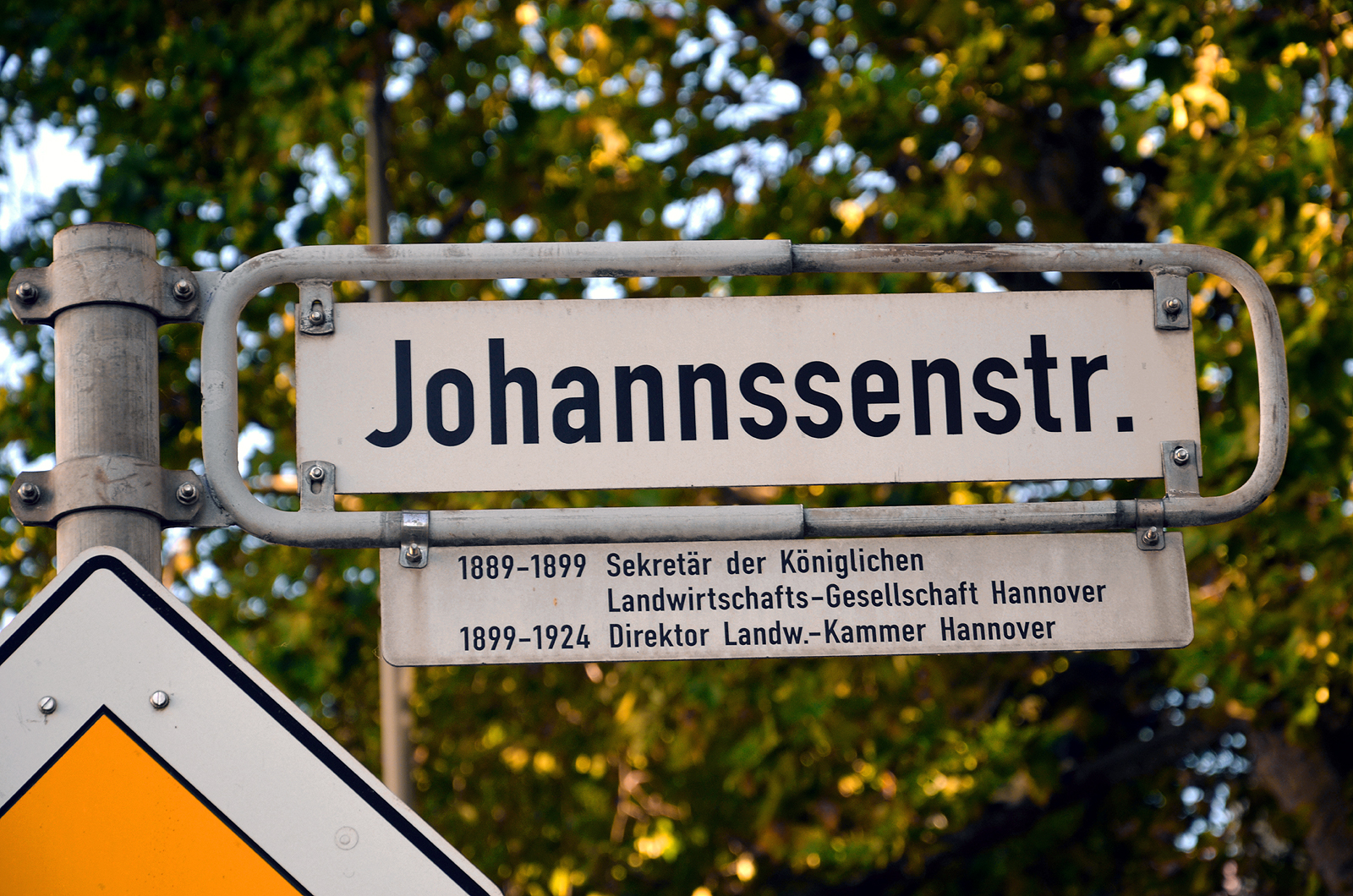 Straßenschild in in Hannover, Stadtteil Mitte, an der 1876 angelegten und nach dem Geheimen Justizrat Leopold Abel benannten, 1952 nach Peter Jacob Johannssen umbenannten Johannssenstraße, mit darunter gesondert angebrachter Legendentafel und dem Text „1889 - 1899 Sekretär der Königlichen Landwirtschafts-Gesellschaft Hannover / 1899 - 1924 Direktor der Landw.-Kammer Hannover“ ...